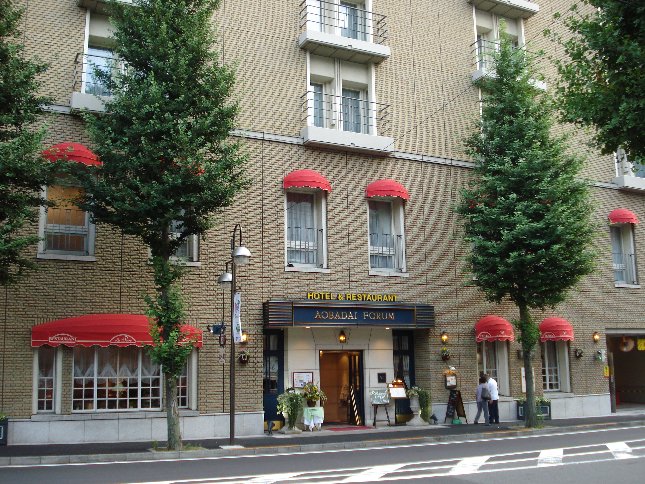 Aobadai Forum